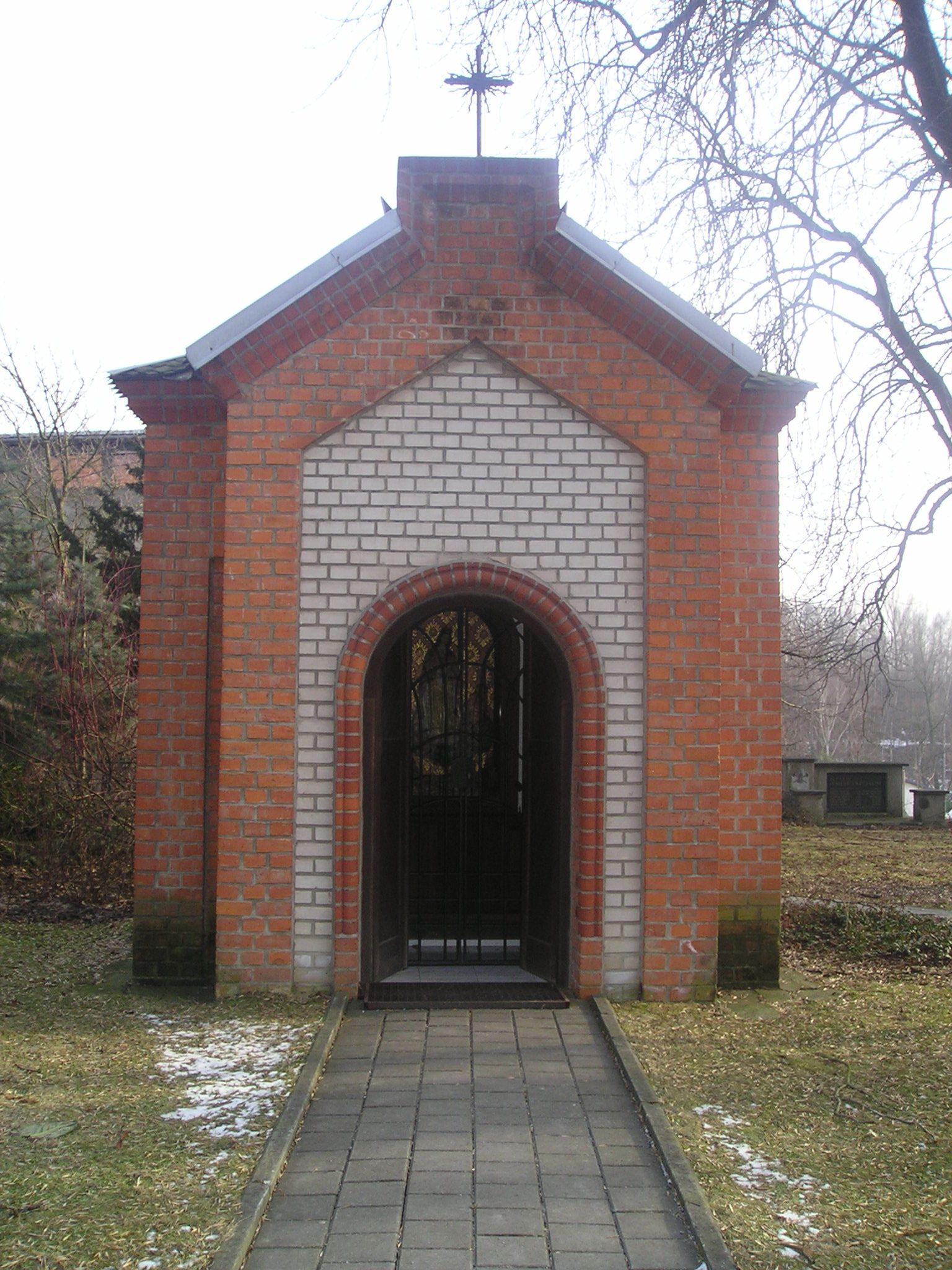 Kaple sv. Barbory Ostrava-Petřkovice, Hornické muzeum